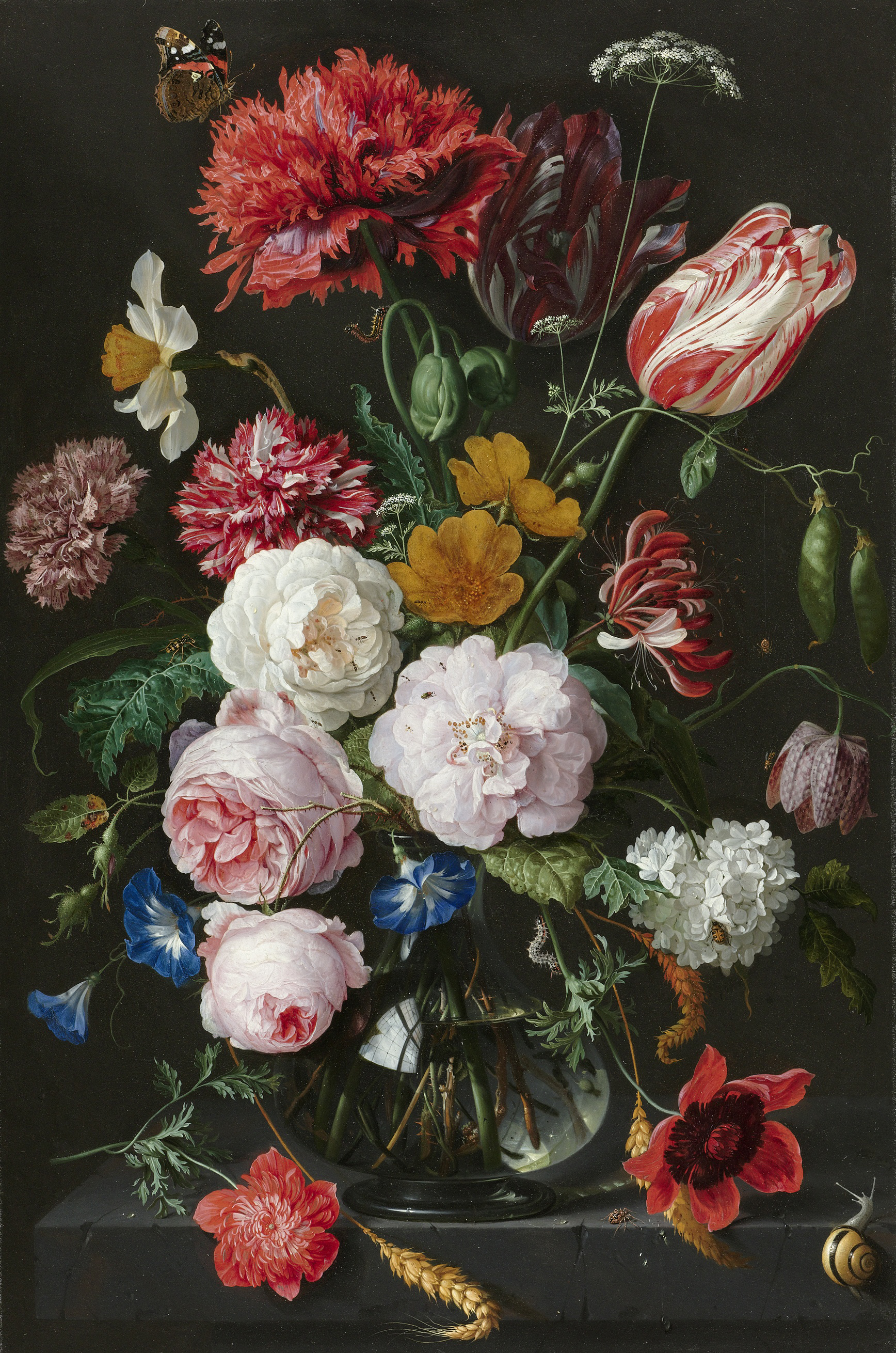 Stilleven met bloemen in een glazen vaas op een stenen blad. Boeket met o.a. dagbloem, roos (wit, roze), tarwe, fluitekruid, anjer (rood-wit), trosnarcis, slaapbol, tulp (rood-wit), pronkerwt, hondsroos, kamperfoelie, kevitsbloem, hortensia, anemoon (rood) en op de plint een anemoon (rood); verder een atalantavlinder, een rups van psivlinder, een spanrups, kevertjes, mieren en andere insekten, spinnen en een tuinslak.